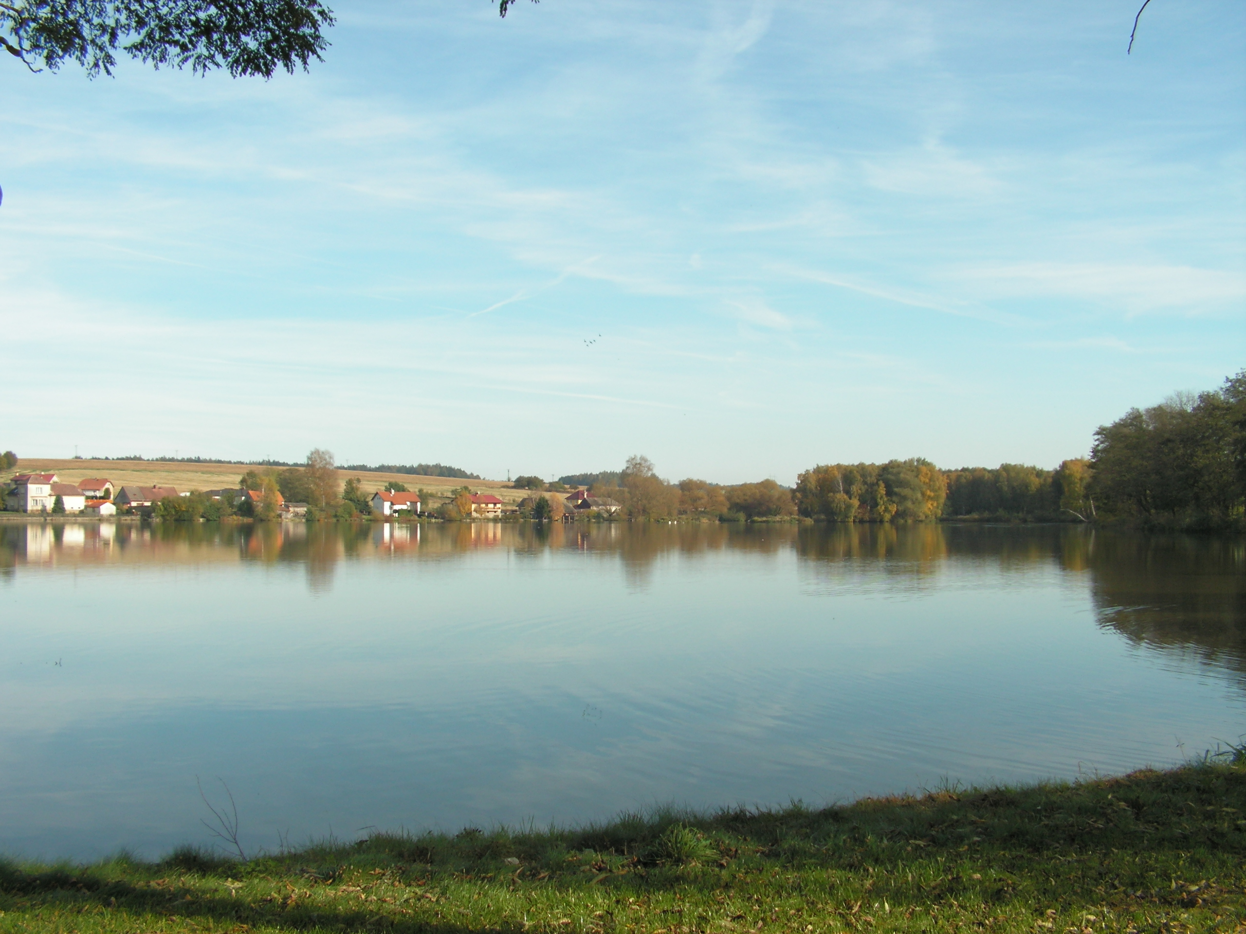 Haberský rybník v Habrech v okrese Havlíčkův Brod.